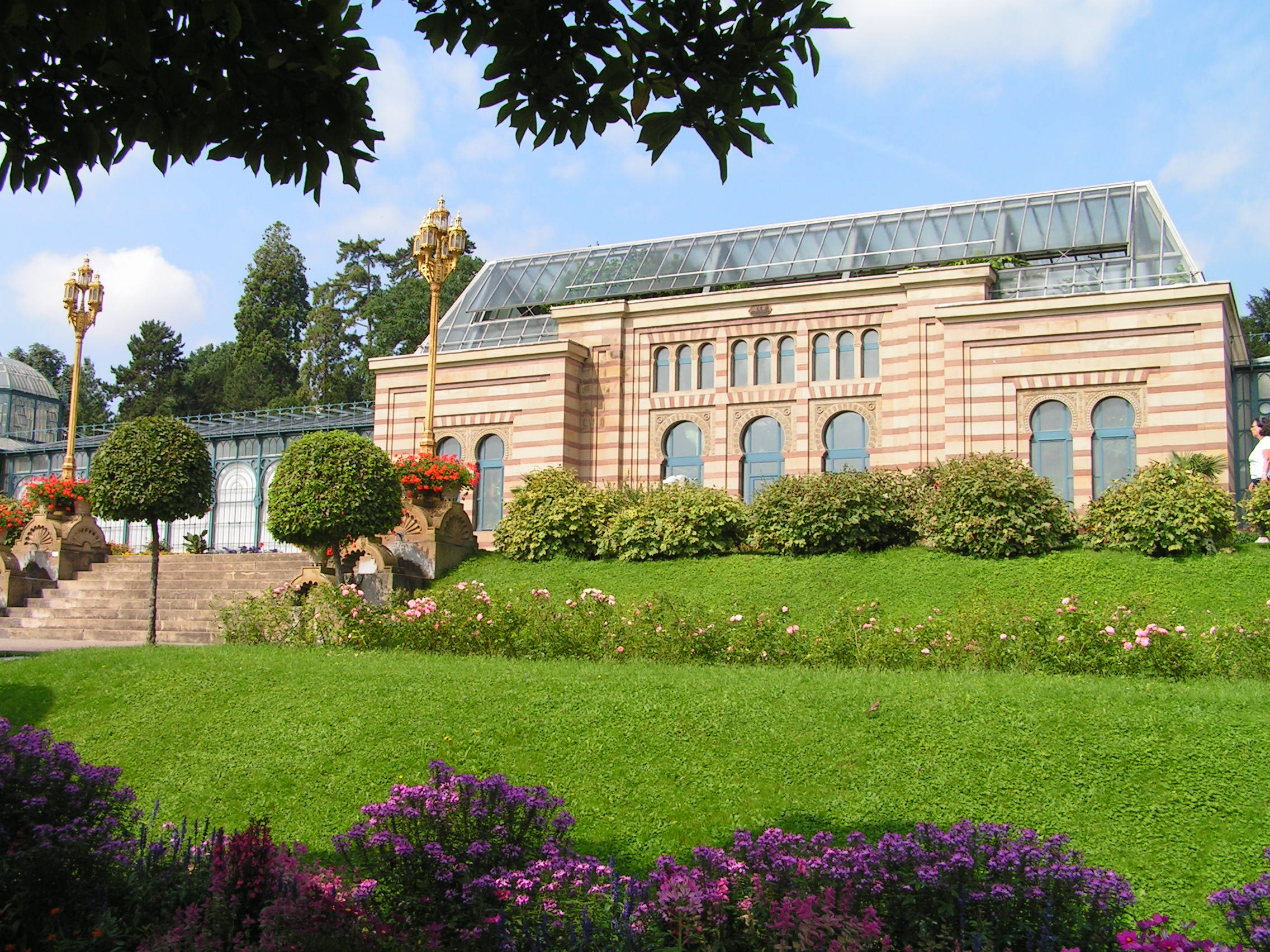 Wilhelma Zoo, Stuttgart